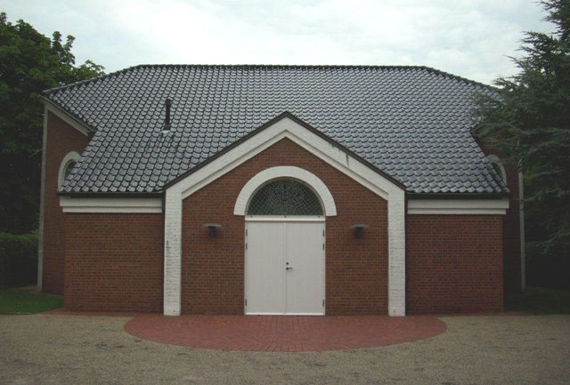 Husum Danske Kirke i Husum, Nordfrisland, Sydslesvig